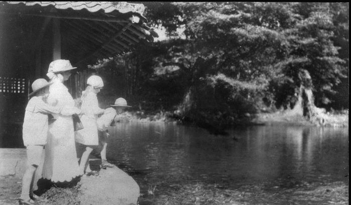 Foto. Het voeren van vissen in een vijver bij Tjigoegoer, ten noorden van Koeningan, West-Java